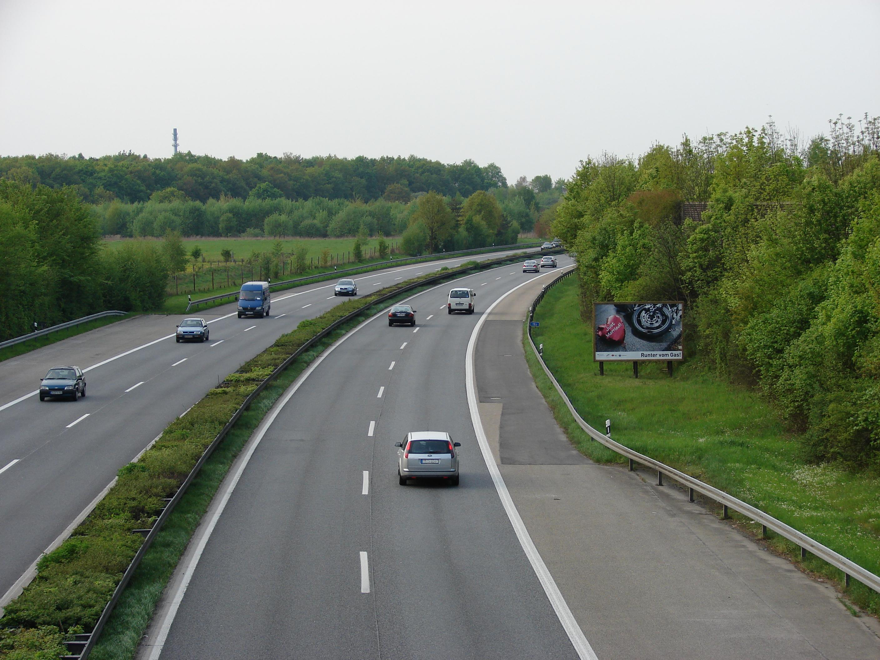 Bundesautobahn 565 im Bereich des einst geplanten Kreuzes Bonn-West